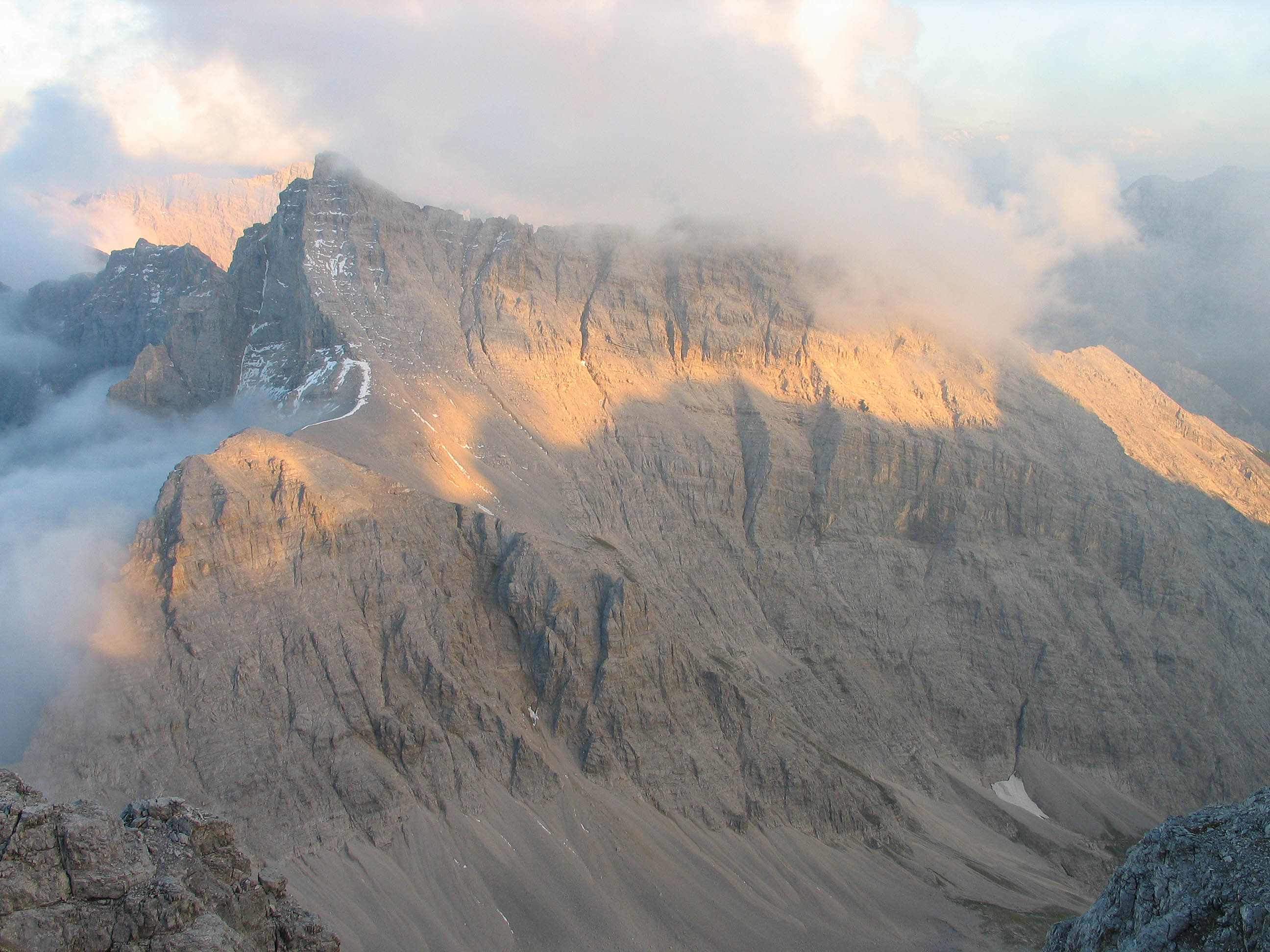 Kaltwasserkarspitze von der Birkkarspitze, Karwendel, Tirol, Österreich